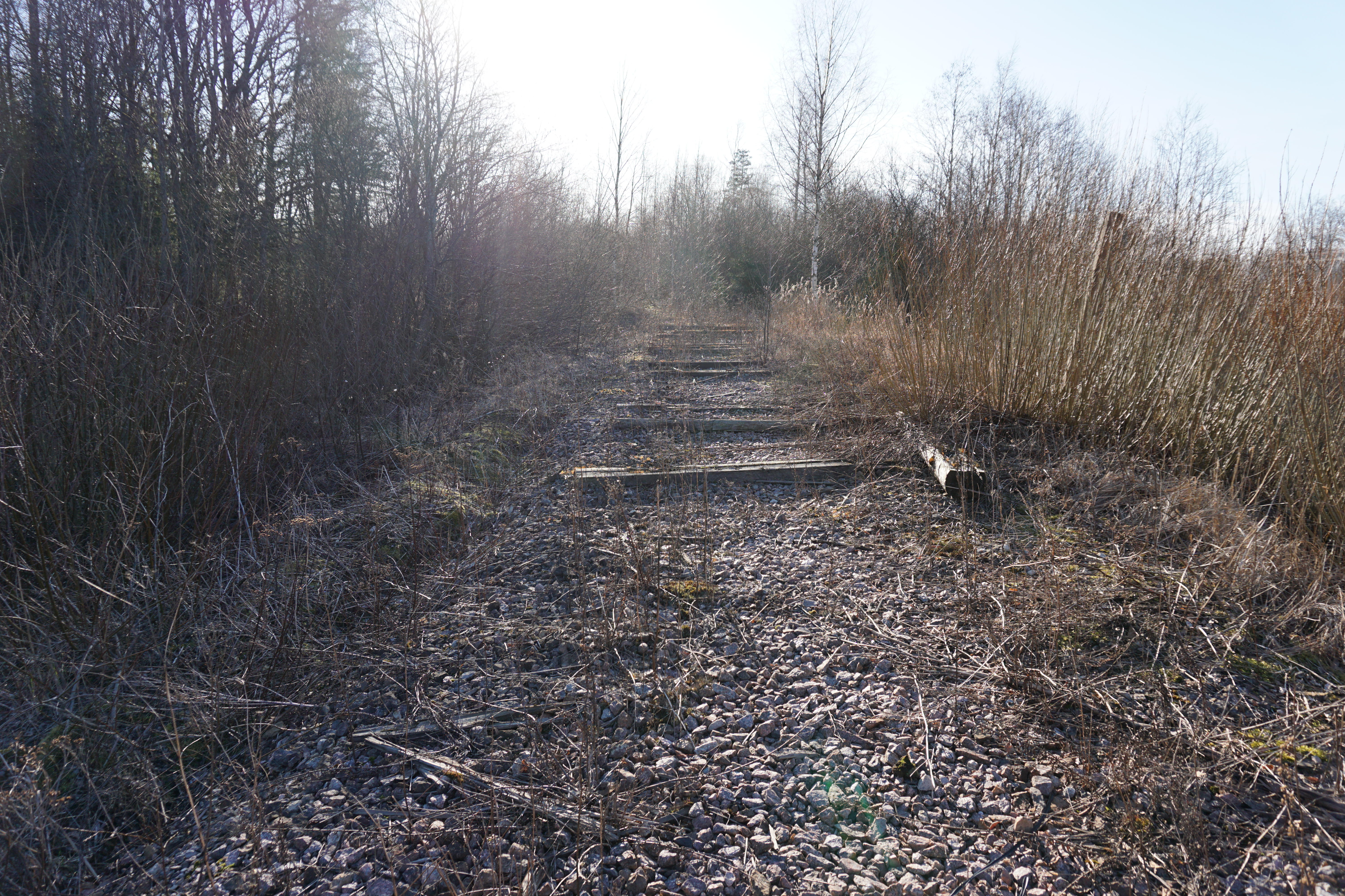 Auvere-Musta vaheline raudteelõik. Raudtee demonteeriti 2000. aastate alguses peale Narva-Musta vahelise reisirongiliini sulgemist. Lõigu pikkus oli ligikaudu 10 km ja sellel liikusid nii kauba- kui ka reisirongid (hilisemalt ka Edelaraudtee).